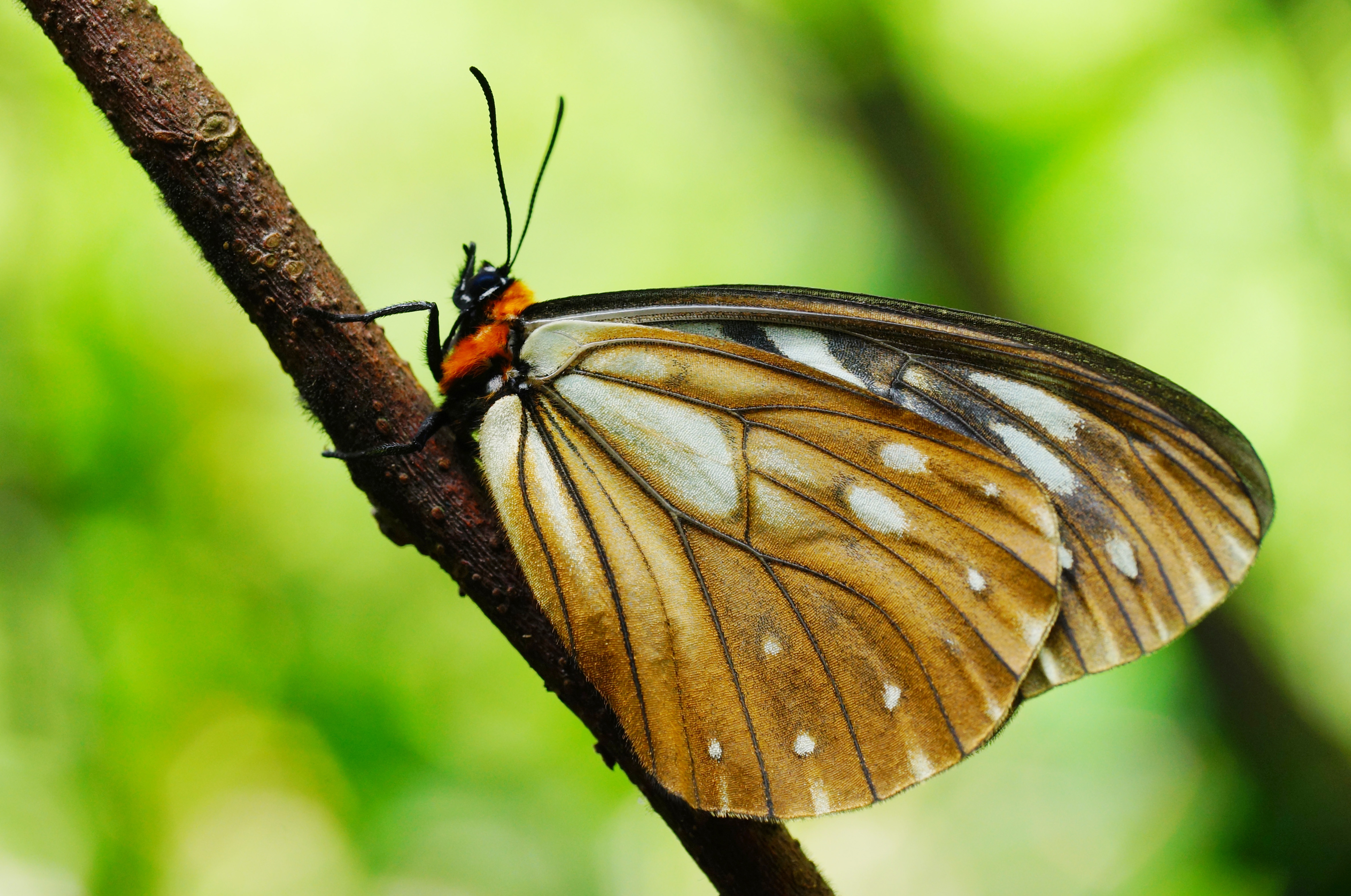 中文（台灣）: 絹蛺蝶 Calinaga buddha formosana